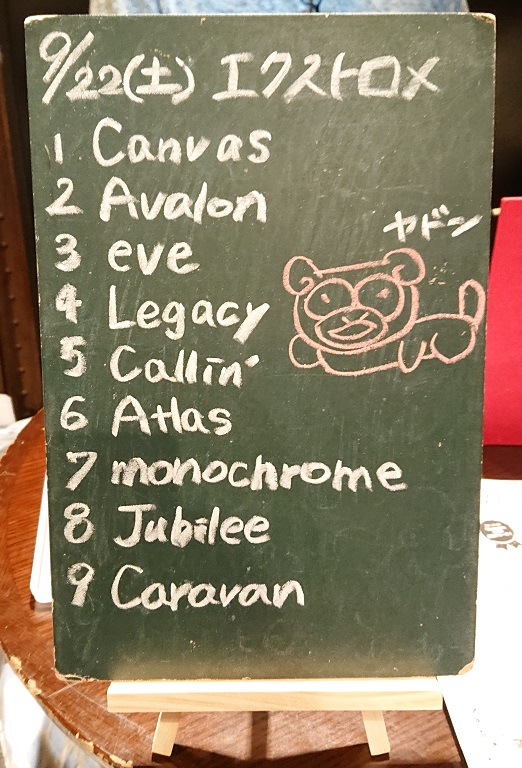 amiinAセトリボード(20180922(1))